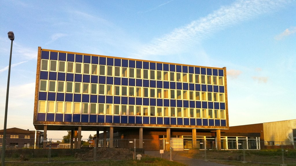 Abbruch bei der Südstadt Flensburg; Dethleffsen Zentrale, Bommerlunder, heute steht dort der Baumarkt Bauhaus